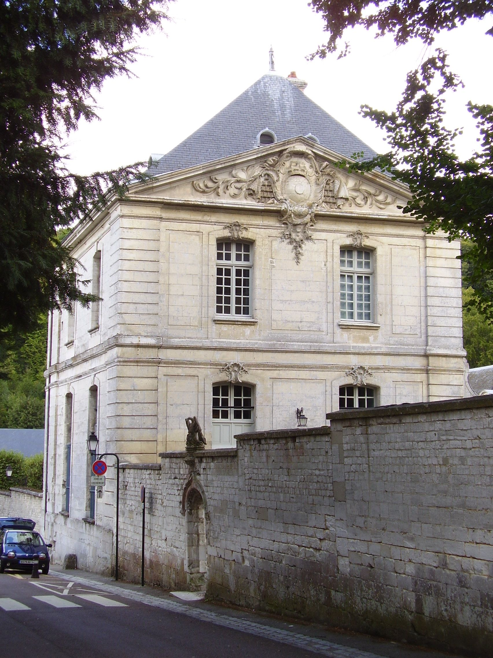 Abbaye de Saint-Wandrille de Fontenelle, France